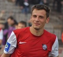 Андрій Гітченко — український футболіст